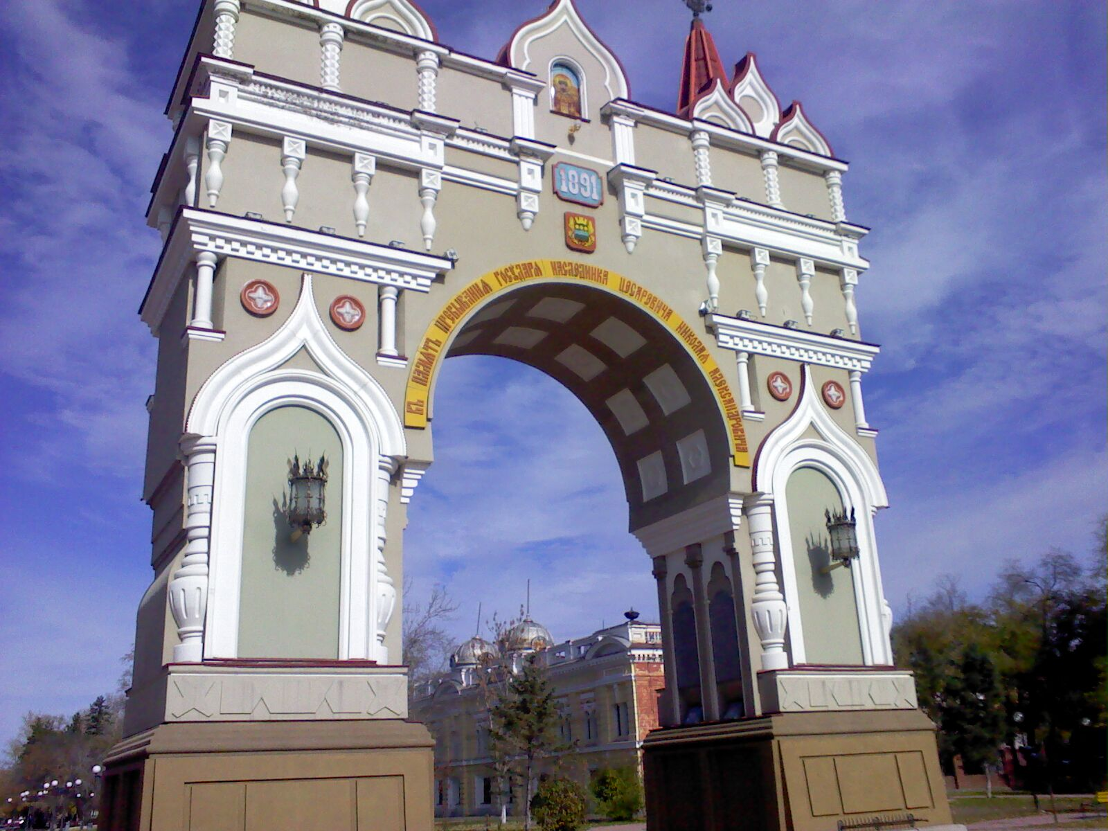 Триумфальная арка на площади Победы